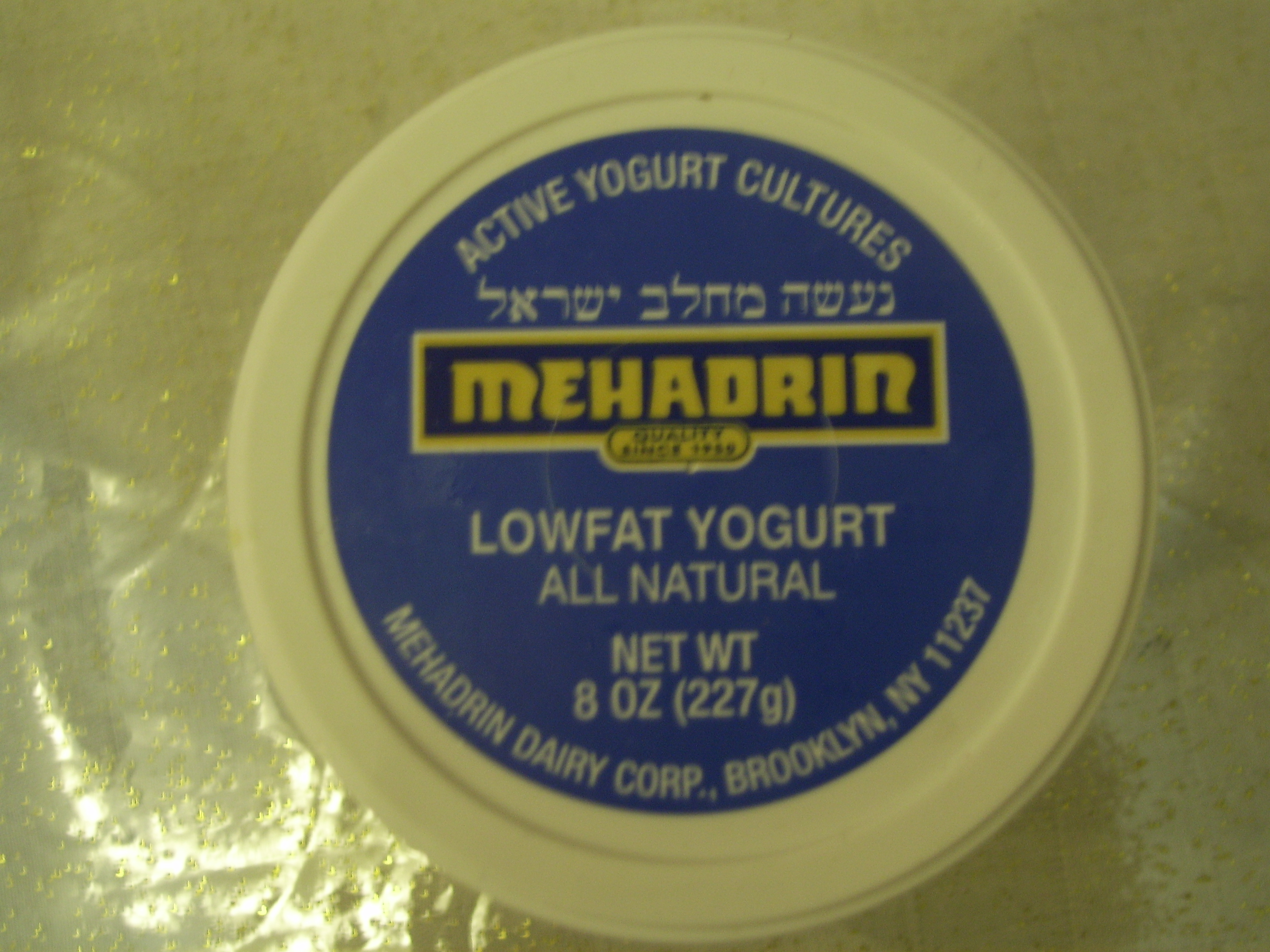 cholov yisroel